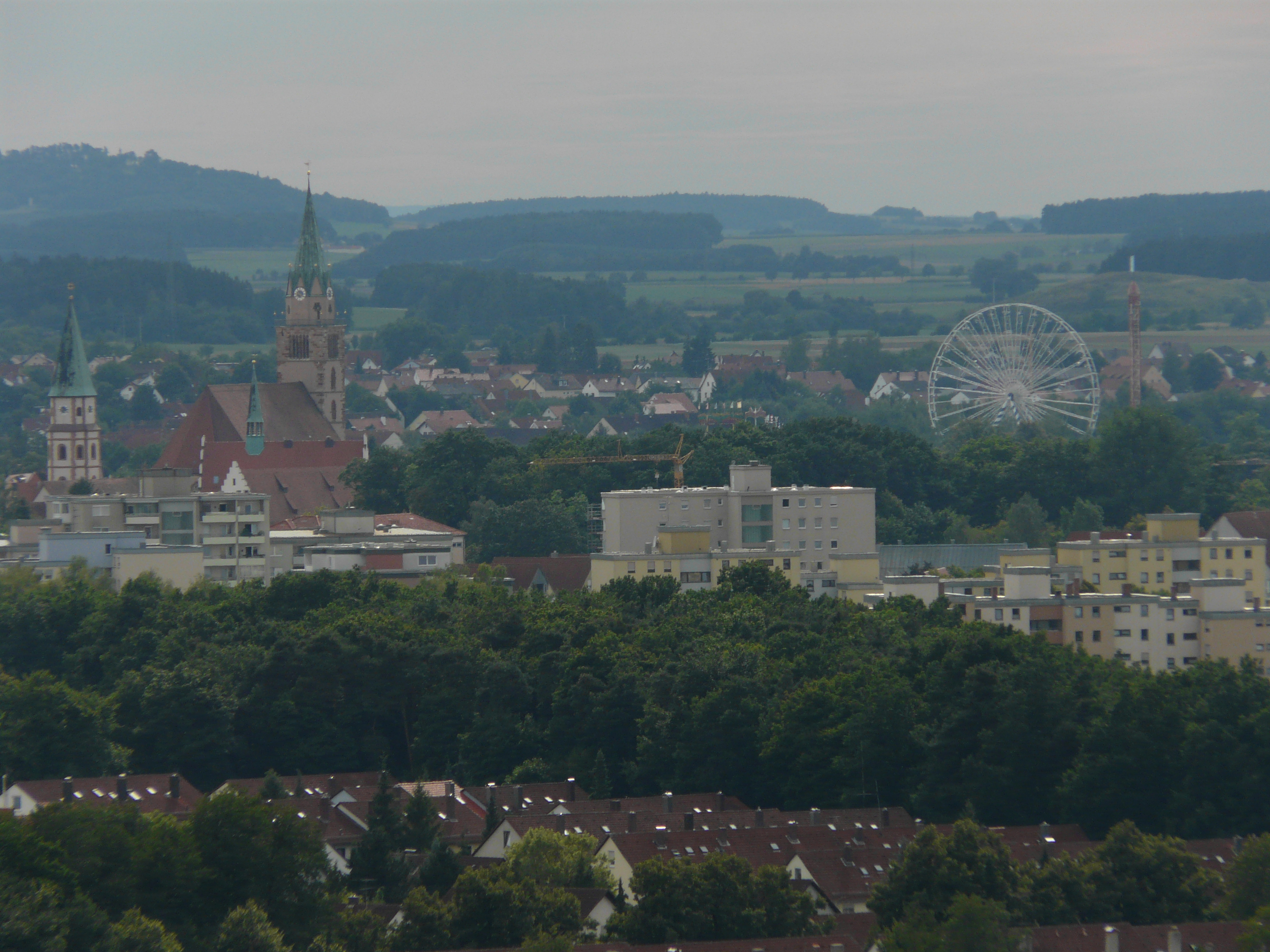 Neumarkt in der Oberpfalz, während des Jura-Volksfestes (von Nordosten aus gesehen).